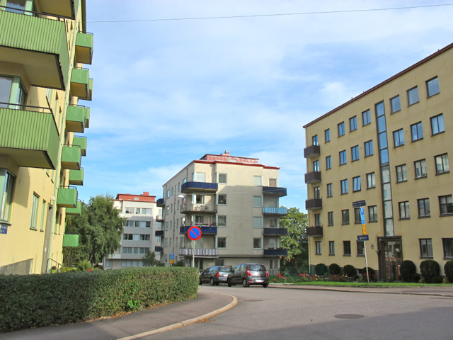 Funkishus på Pontus Wiknersgatan i Johanneberg i Göteborg